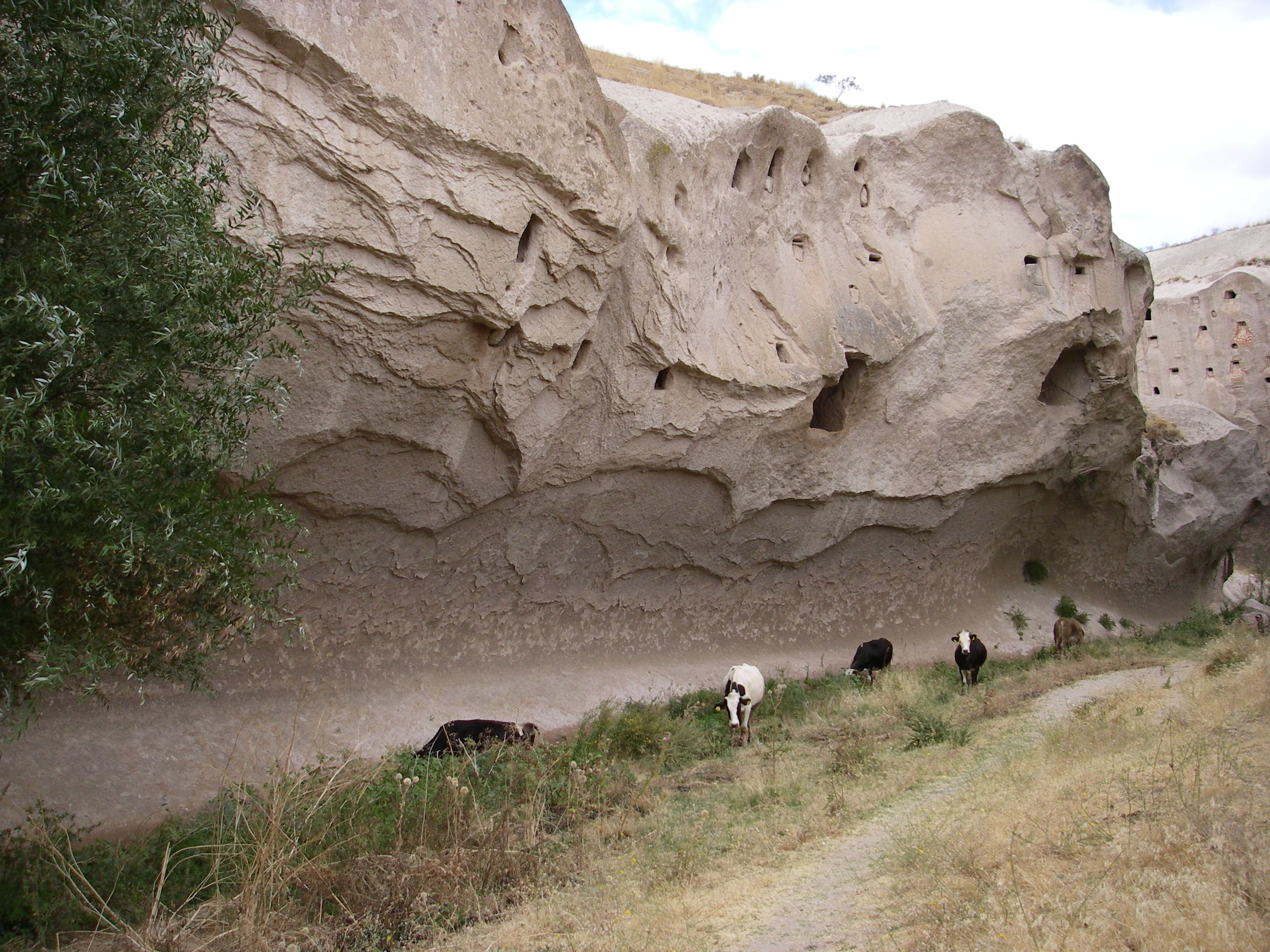 Çat Valley, Nevşehir, Cappadocia, Turkey